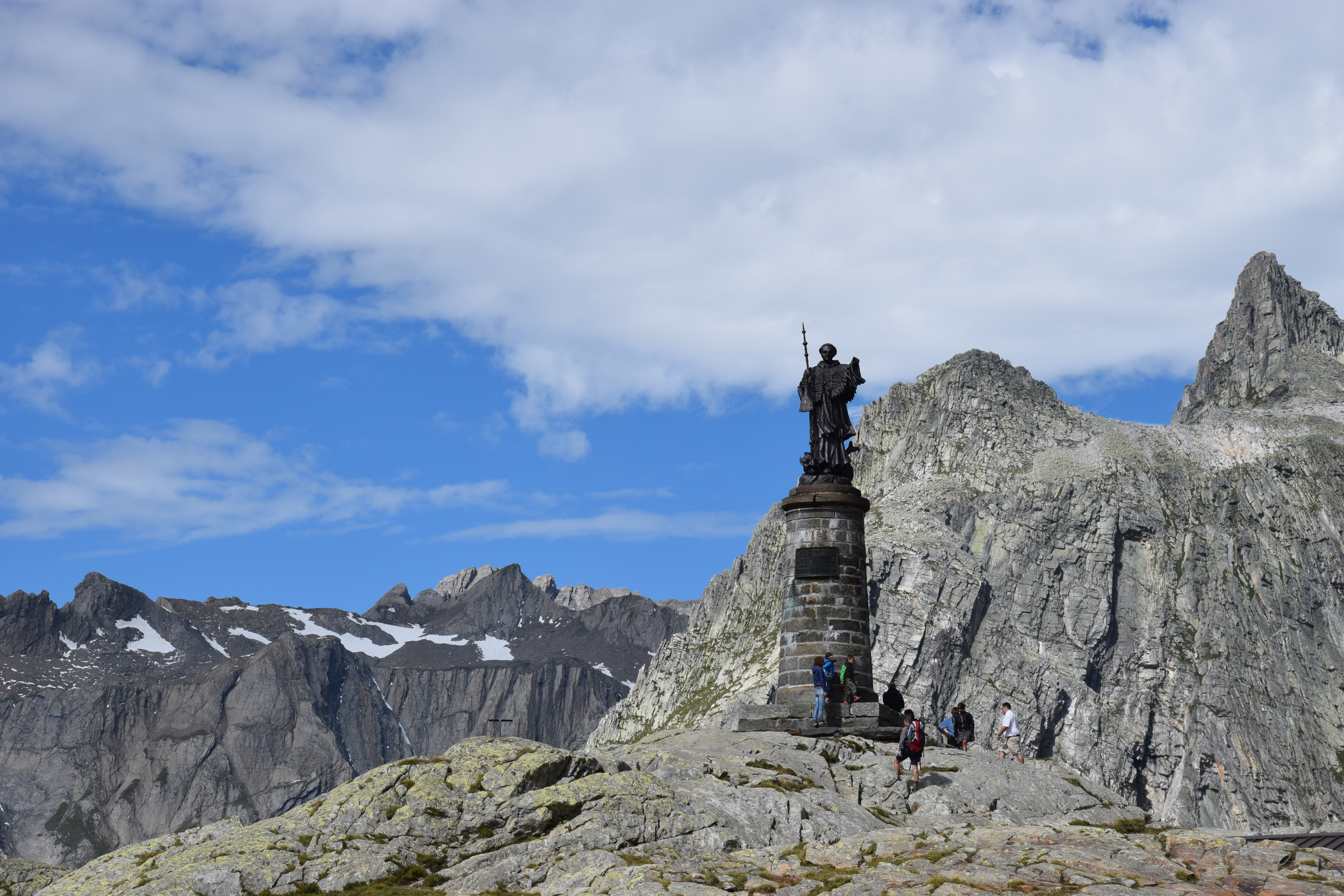 Großer Sankt Bernhard, Passhöhe, Denkmal Pius XI